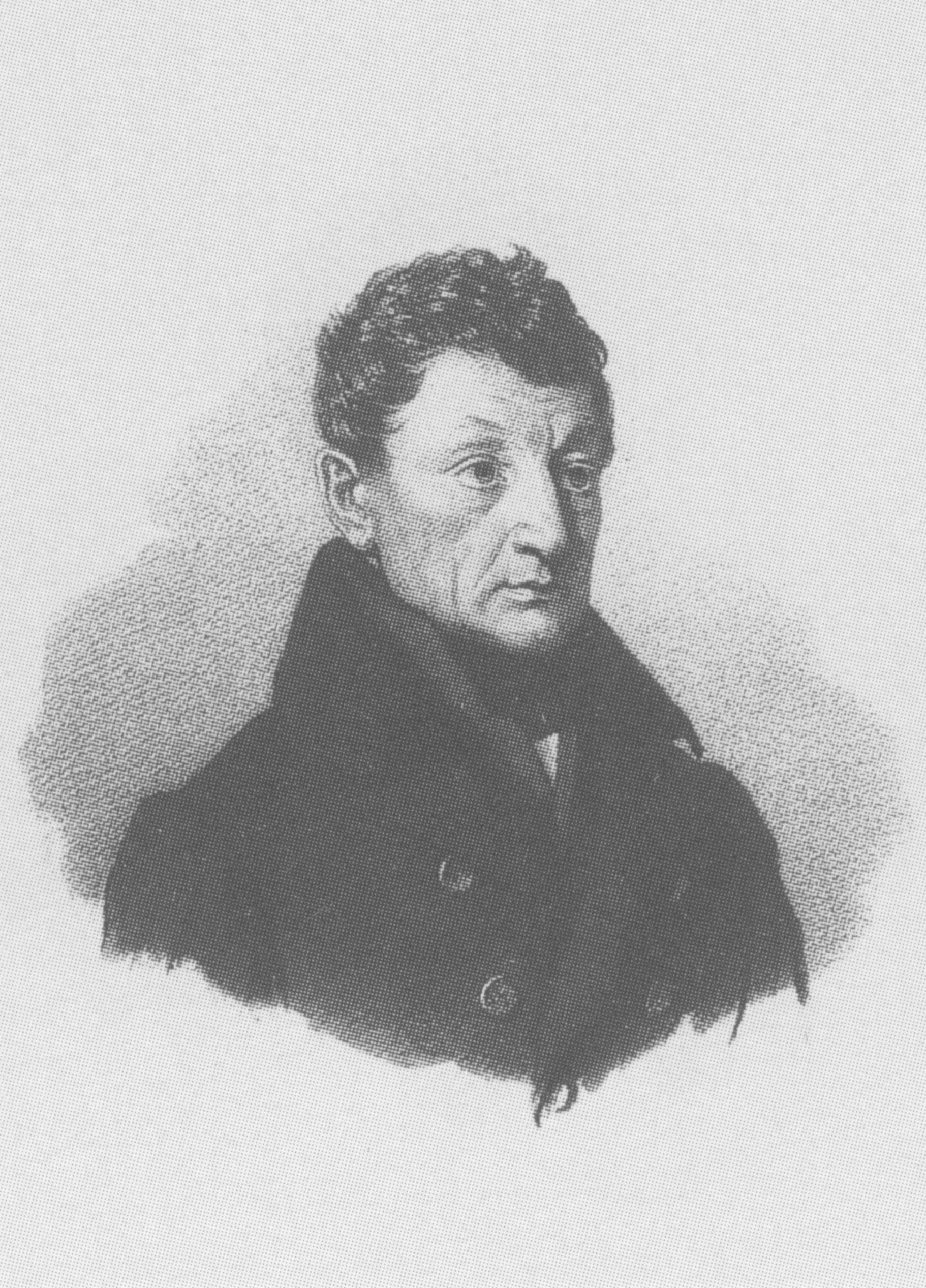 Porträt von Dietrich von Miltitz (1769–1853), deutscher General und Rittergutsbesitzer